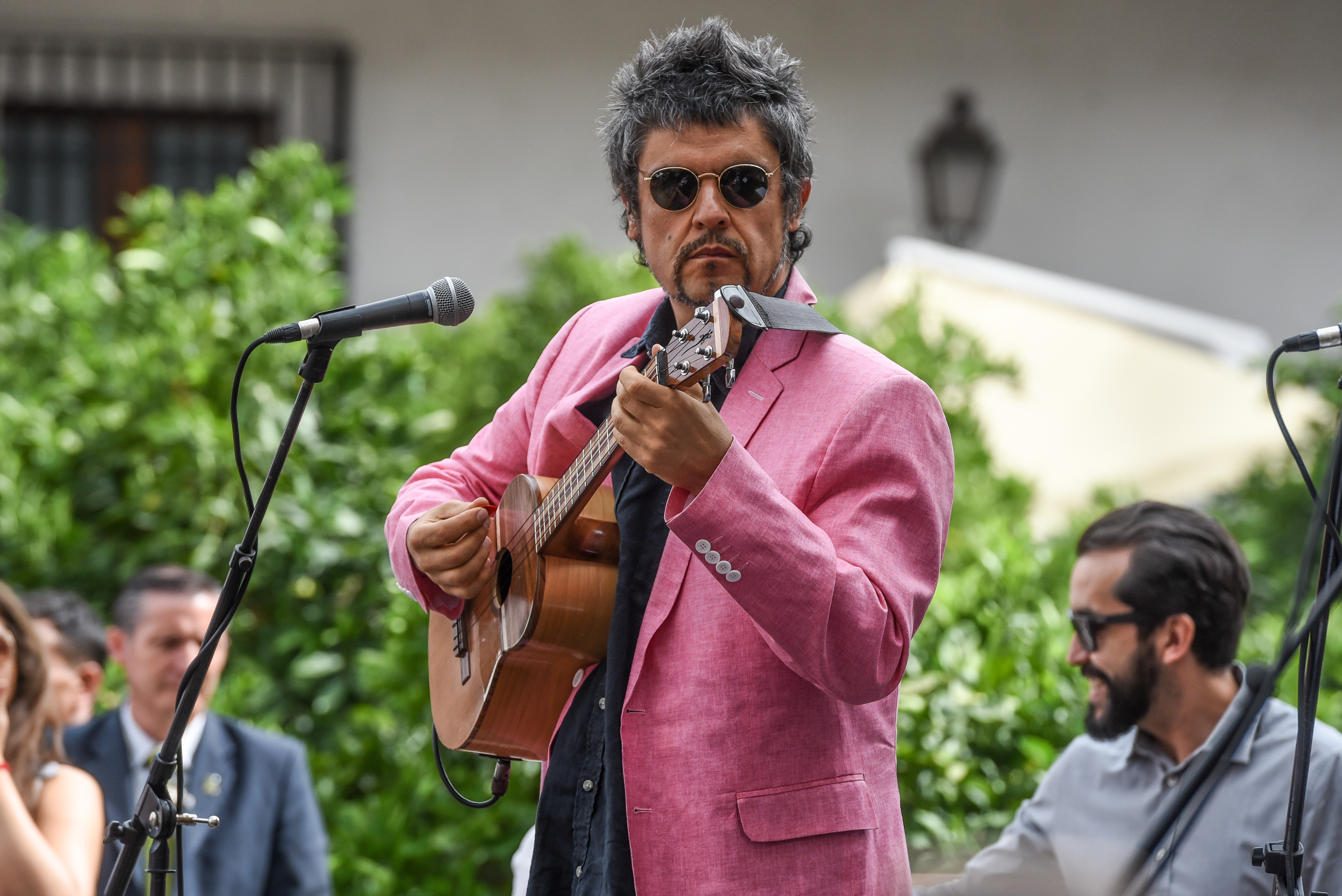 Ministra Paula Narváez participa en el Lanzamiento del primer Plan Nacional de Derechos Humanos